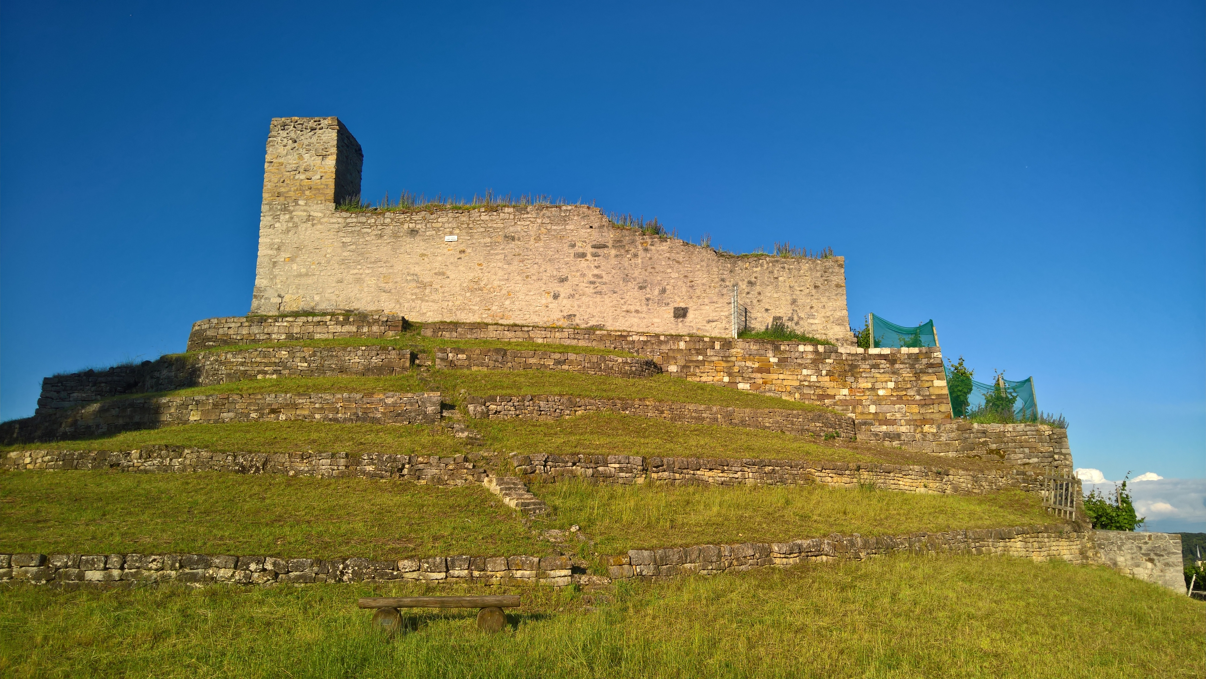 Burgruine in Hoheneck (Ludwigsburg) im Sommer